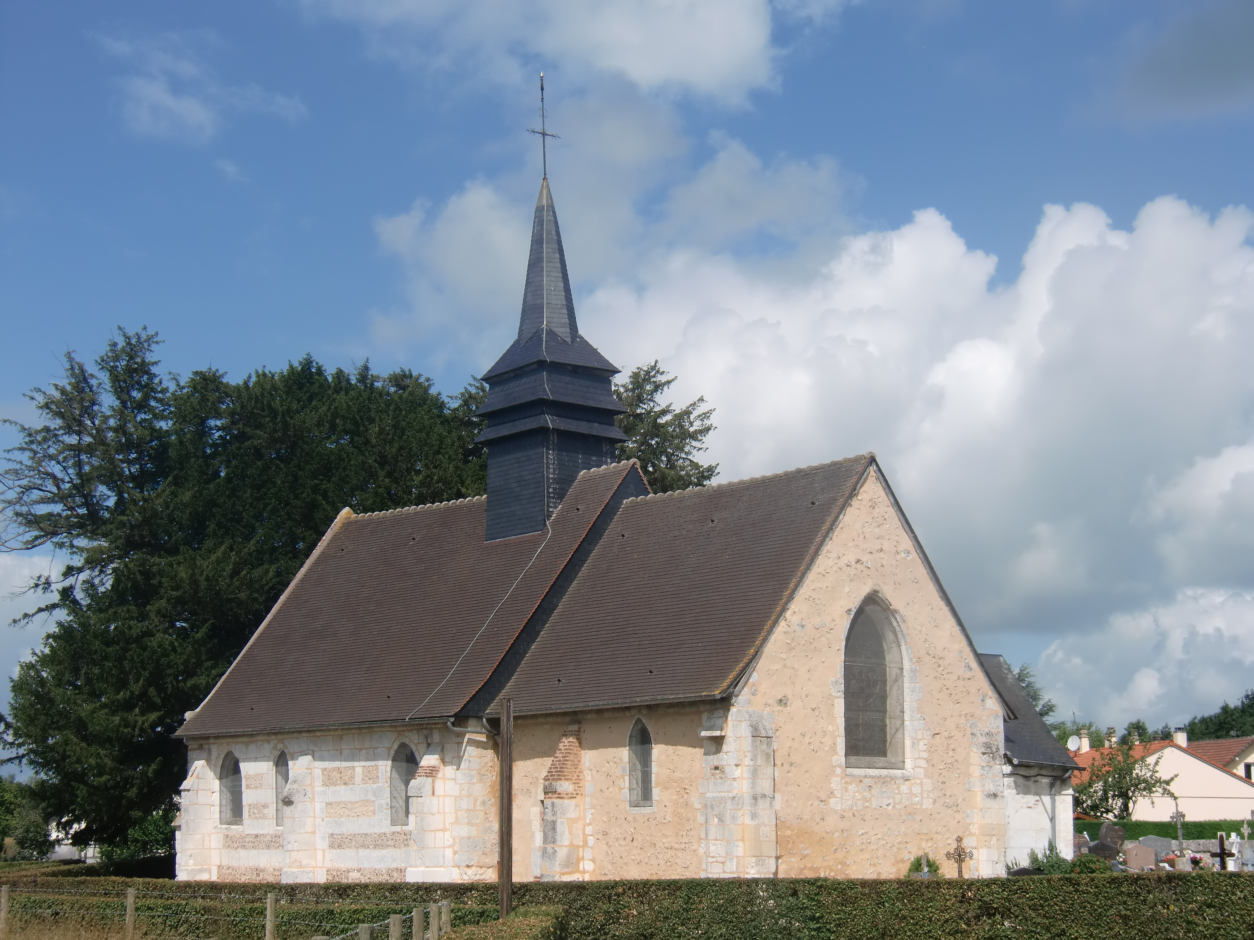 Eglise de Tocqueville (Eure, Normandie, France)